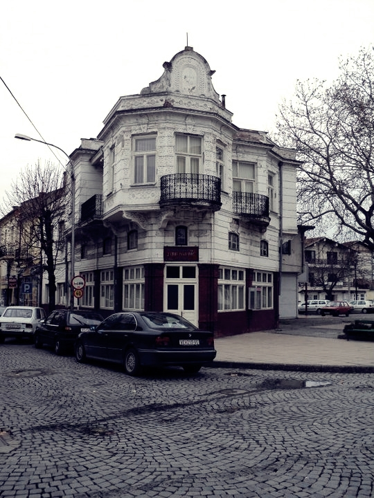 Гевгелија, Македонија